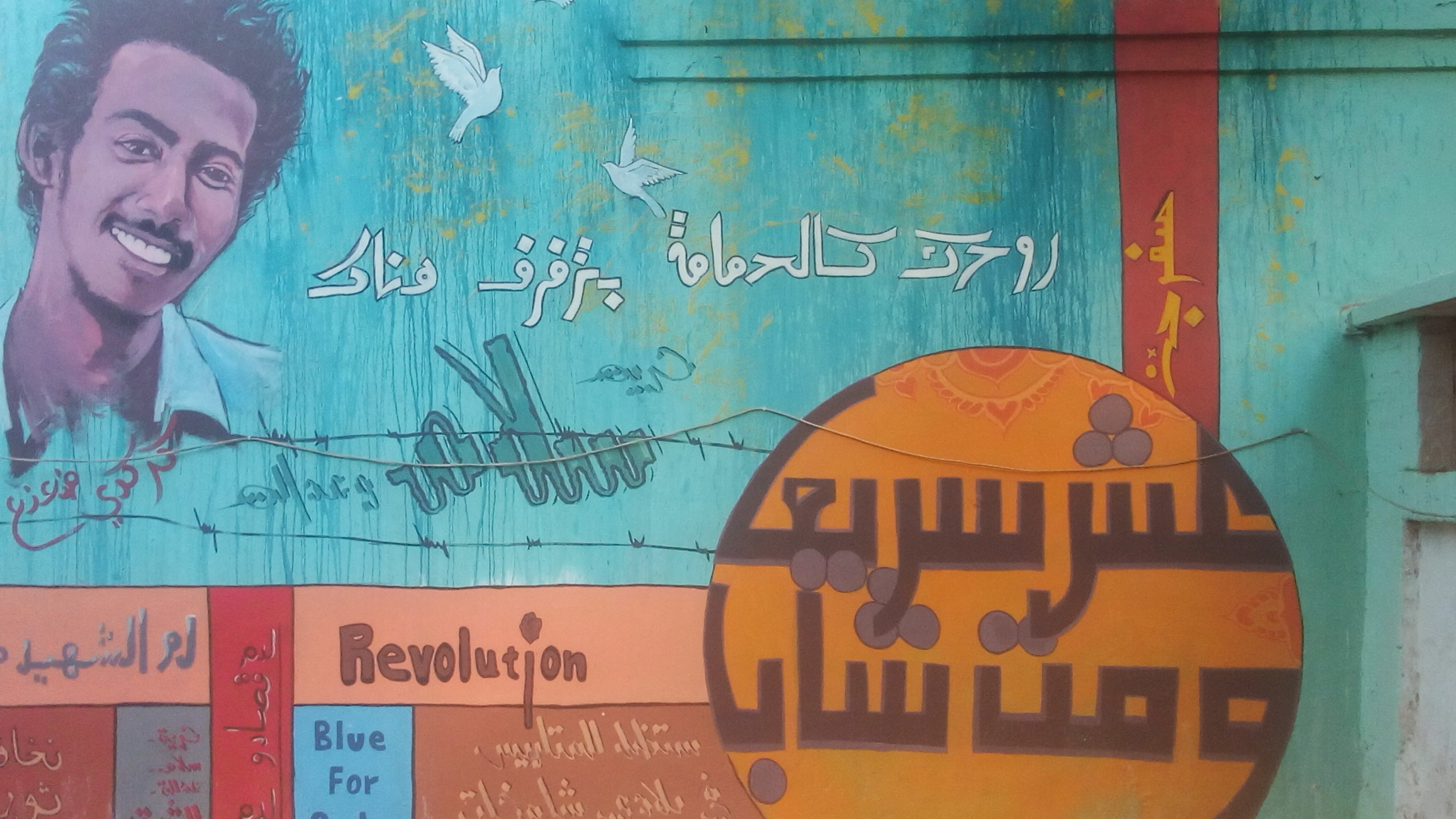 صورة عبد السلام كشة شهيد مجزرة القيادة العامة